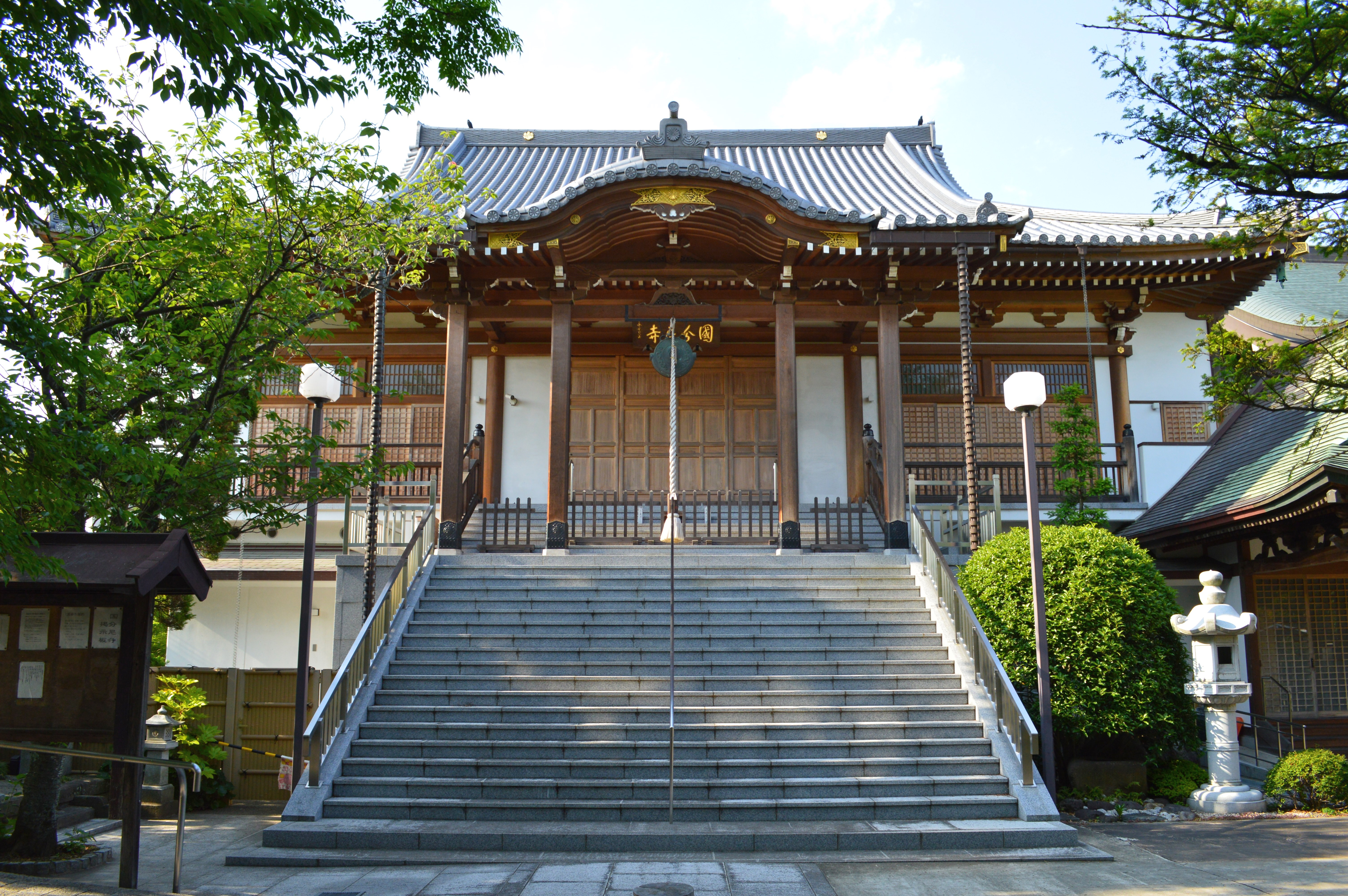 陸奥国分尼寺 本堂